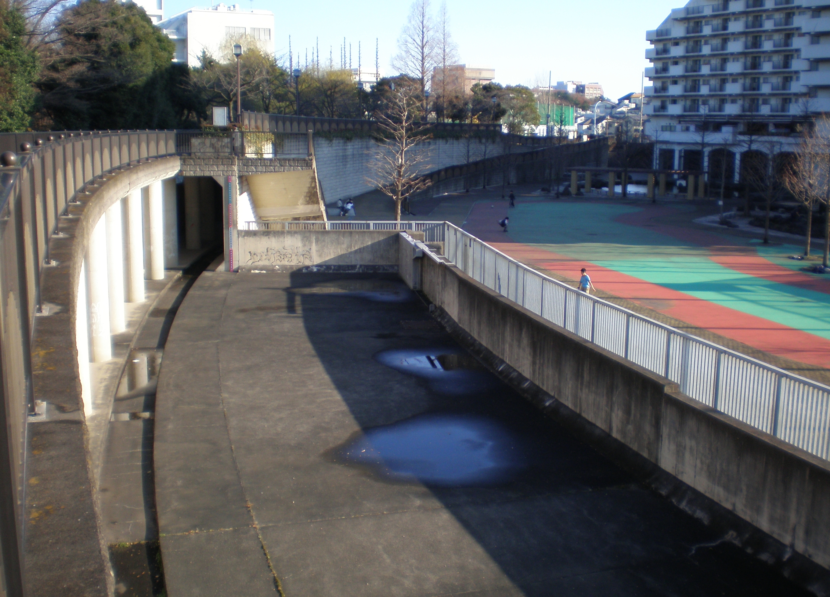 妙正寺川公園。哲学堂のすぐ南。高架のような構造物のすぐ左側に妙正寺川が流れており、調整池の機能が持たされている。地図はこちら。